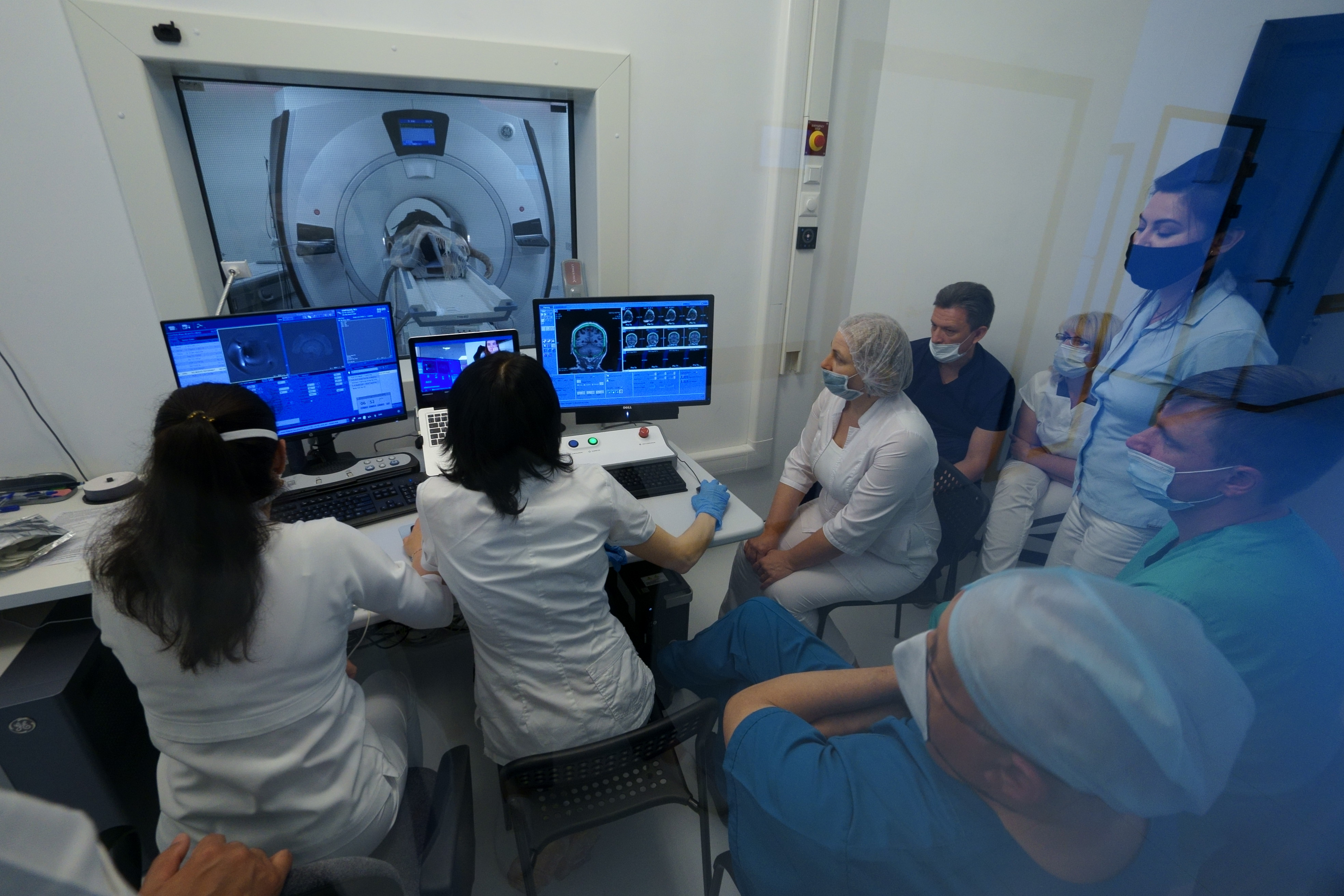 Операционная состоит из комнаты МРТ, отделенной от пультовой. В пультовой врач-нейрохирург, рентгенолог специалист-МРТ рассчитывают точки воздействия и проводят лечение